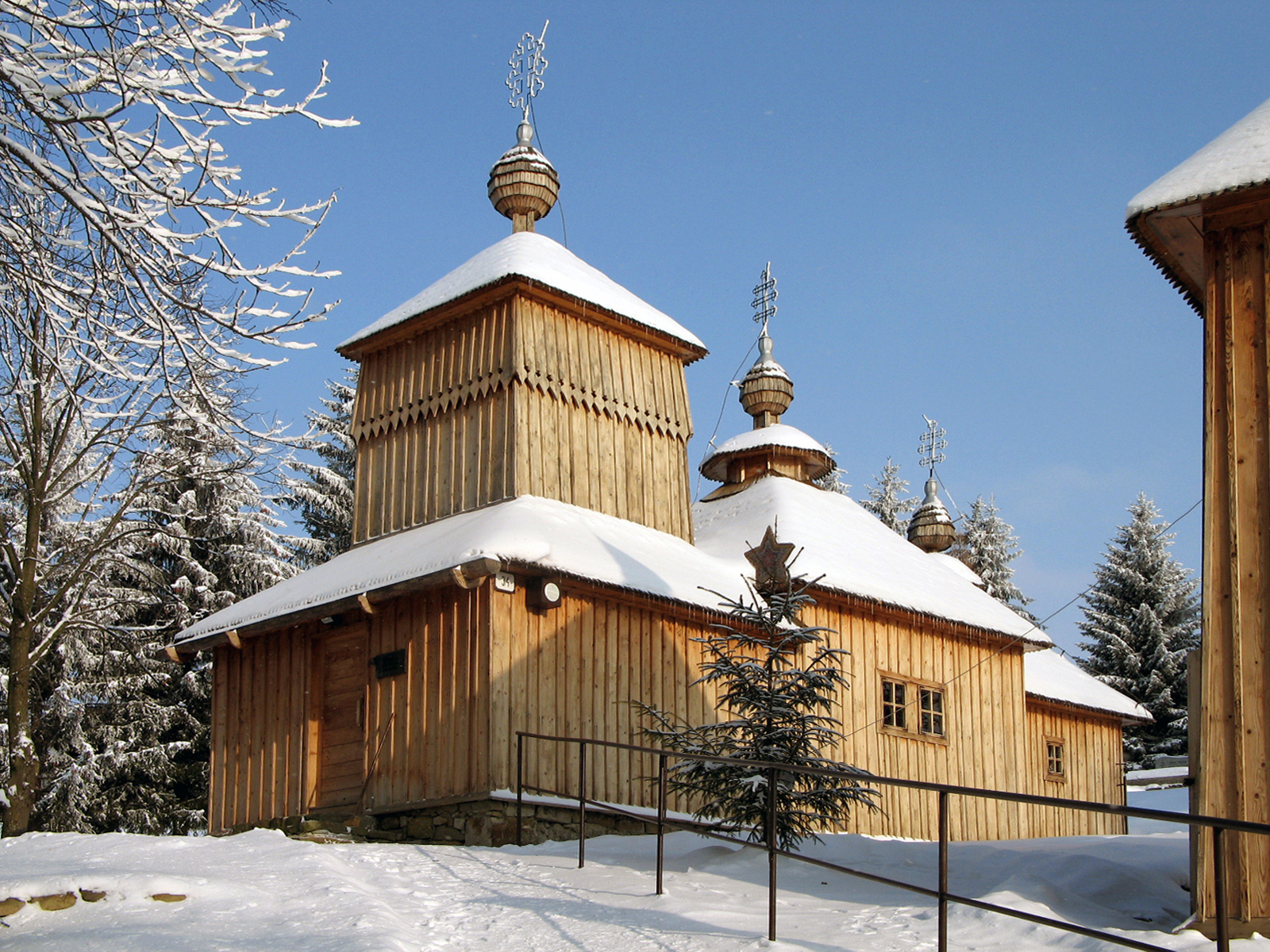 Chrám Ochrany Presvätej Bohorodičky v Korejovciach (okr. Svidník)